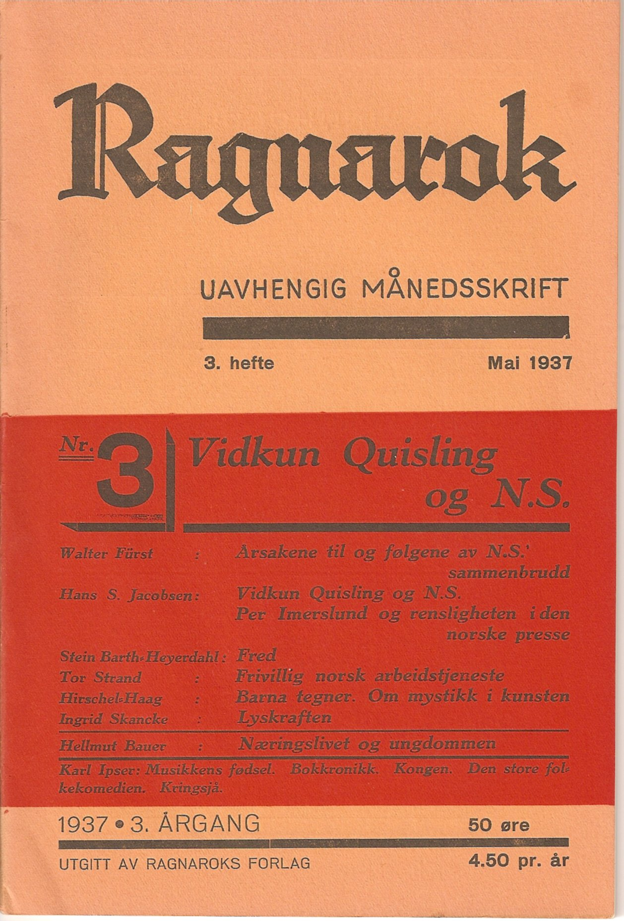 Ragnarok 3. hefte 1937